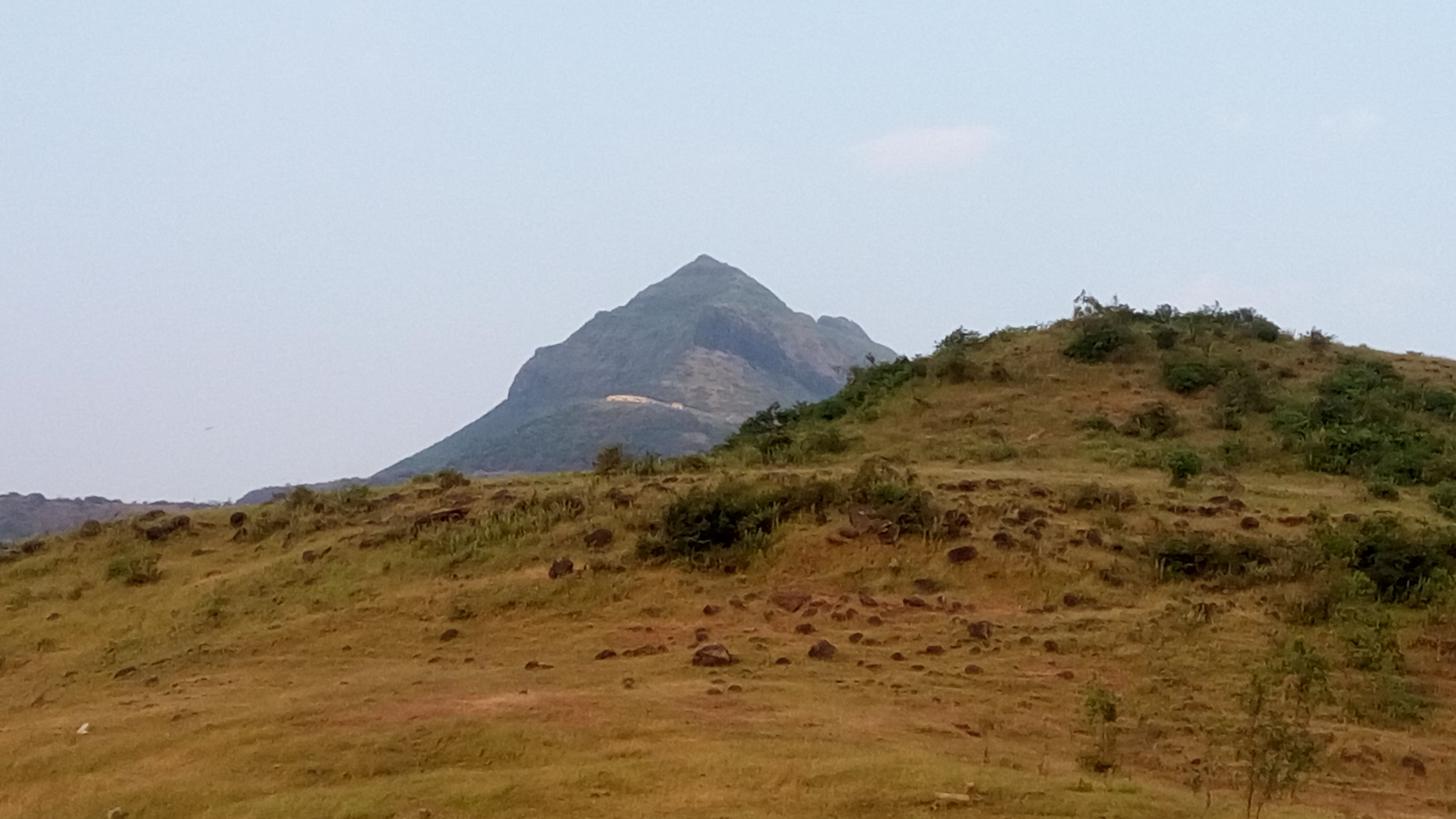 Vajragad fort